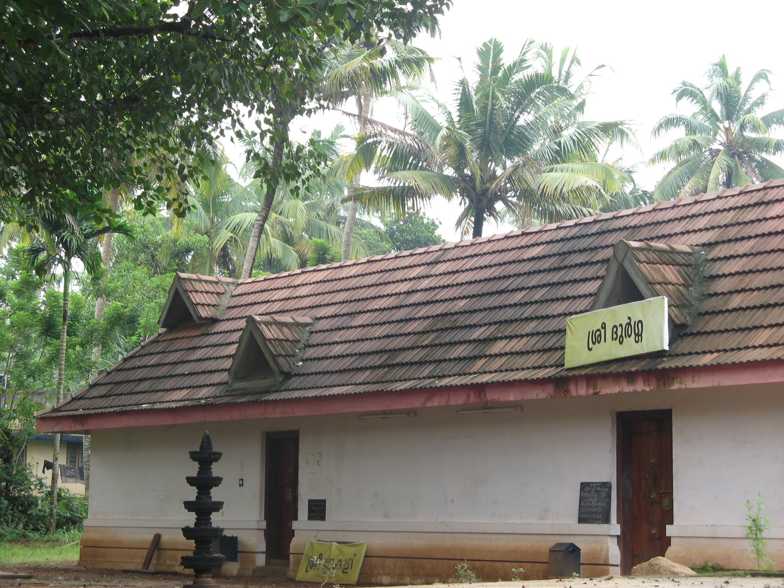 തലയാക്കുളം ഭഗവതി ക്ഷേത്രം